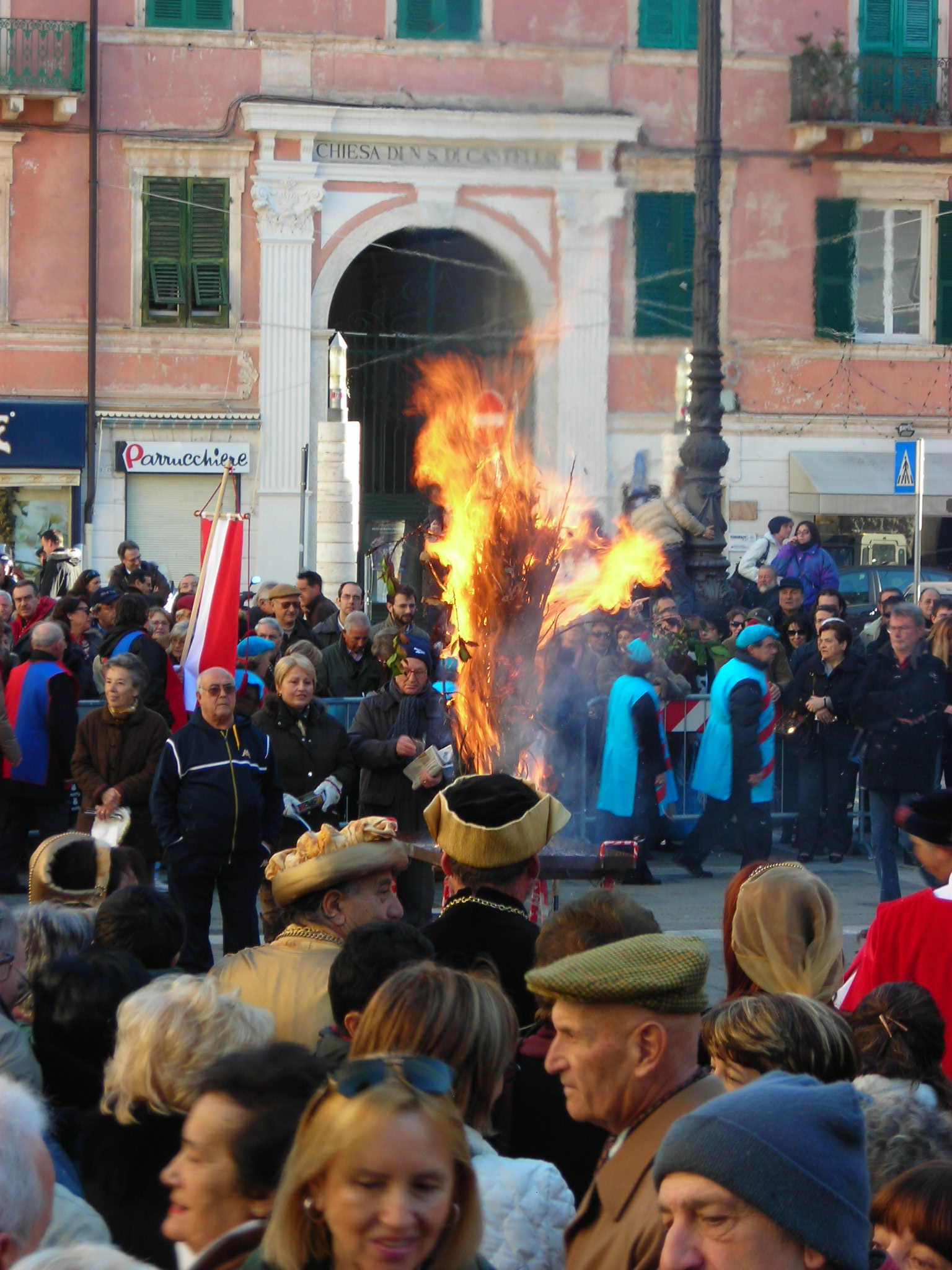 Celebrazione del "Confuoco" di Savona, Liguria, Italia